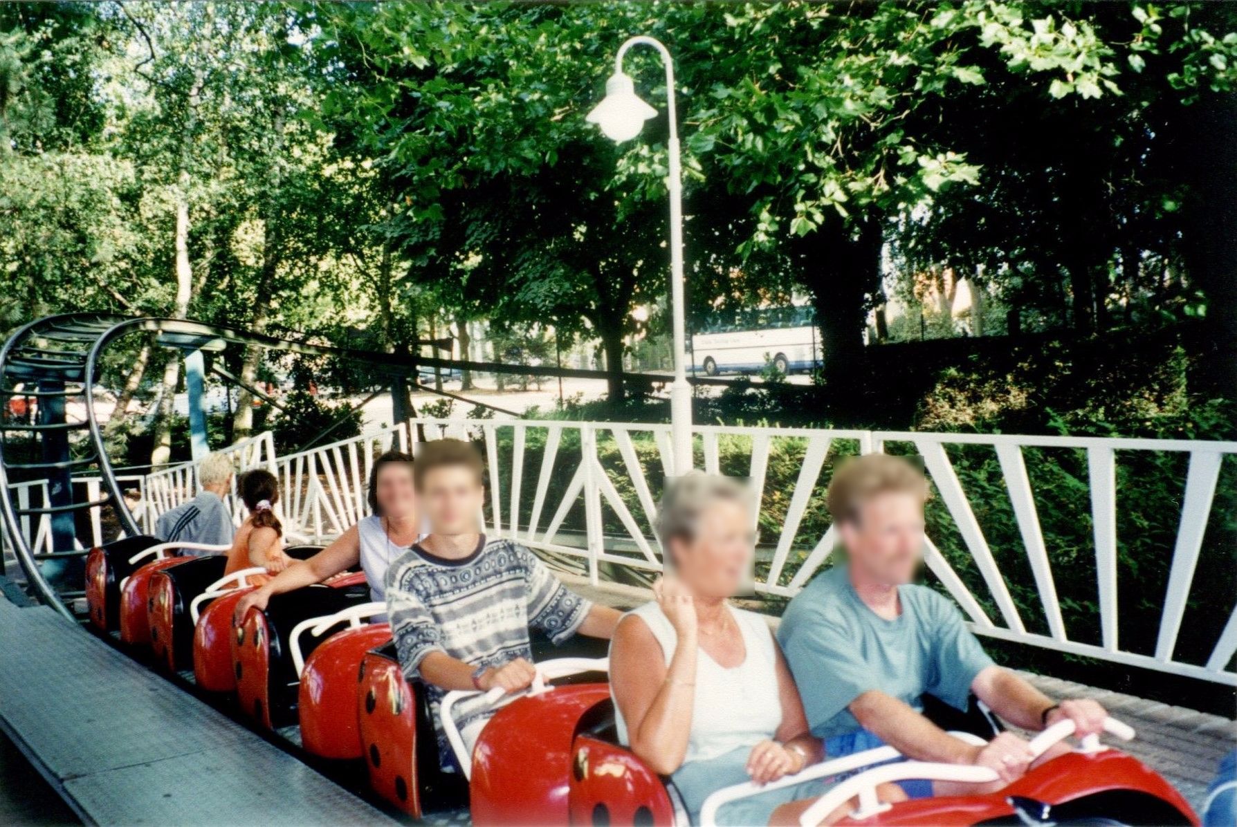 MeliparkScarabe